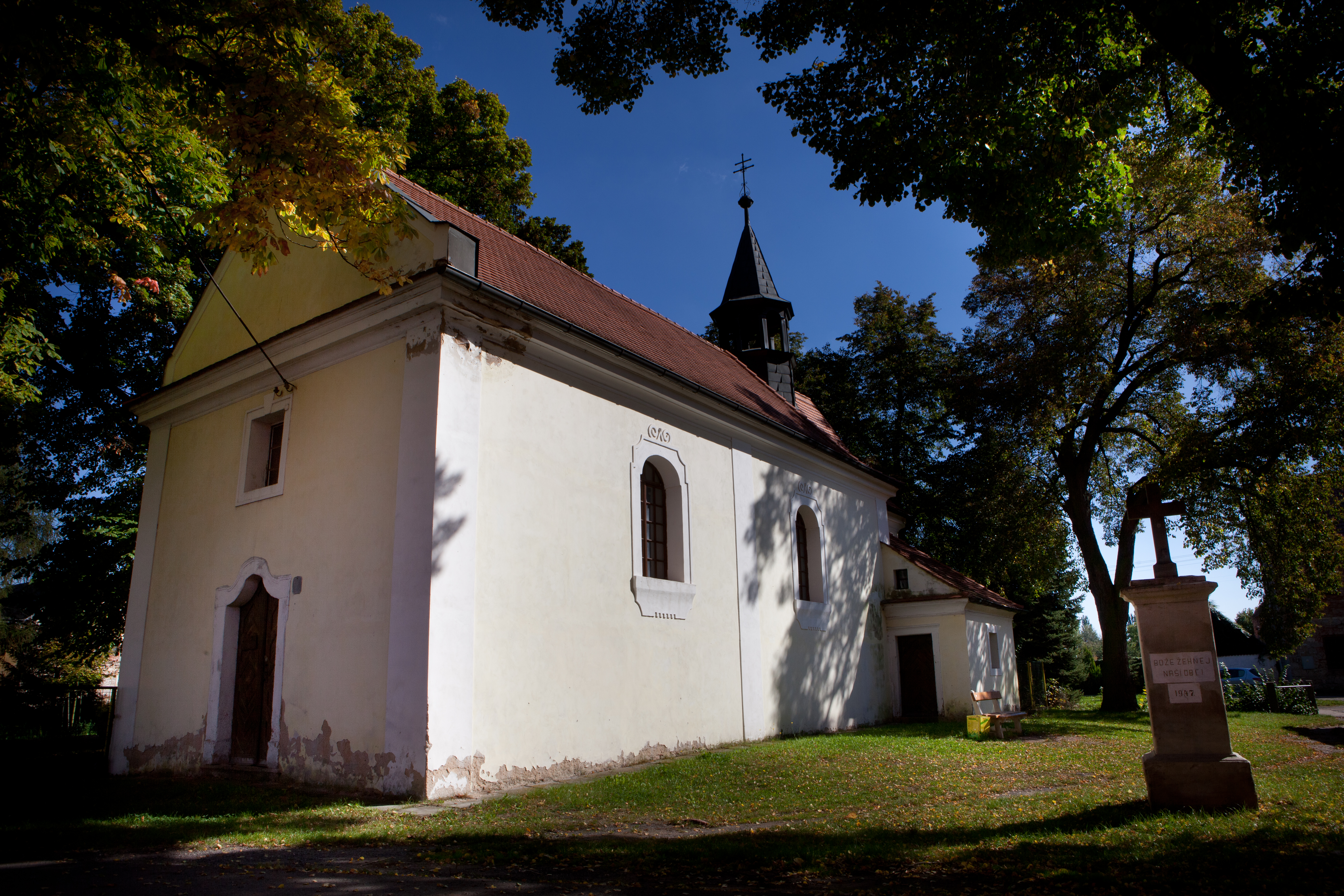 Kostel sv. Vavřince (Hořesedly), náves, Hořesedly